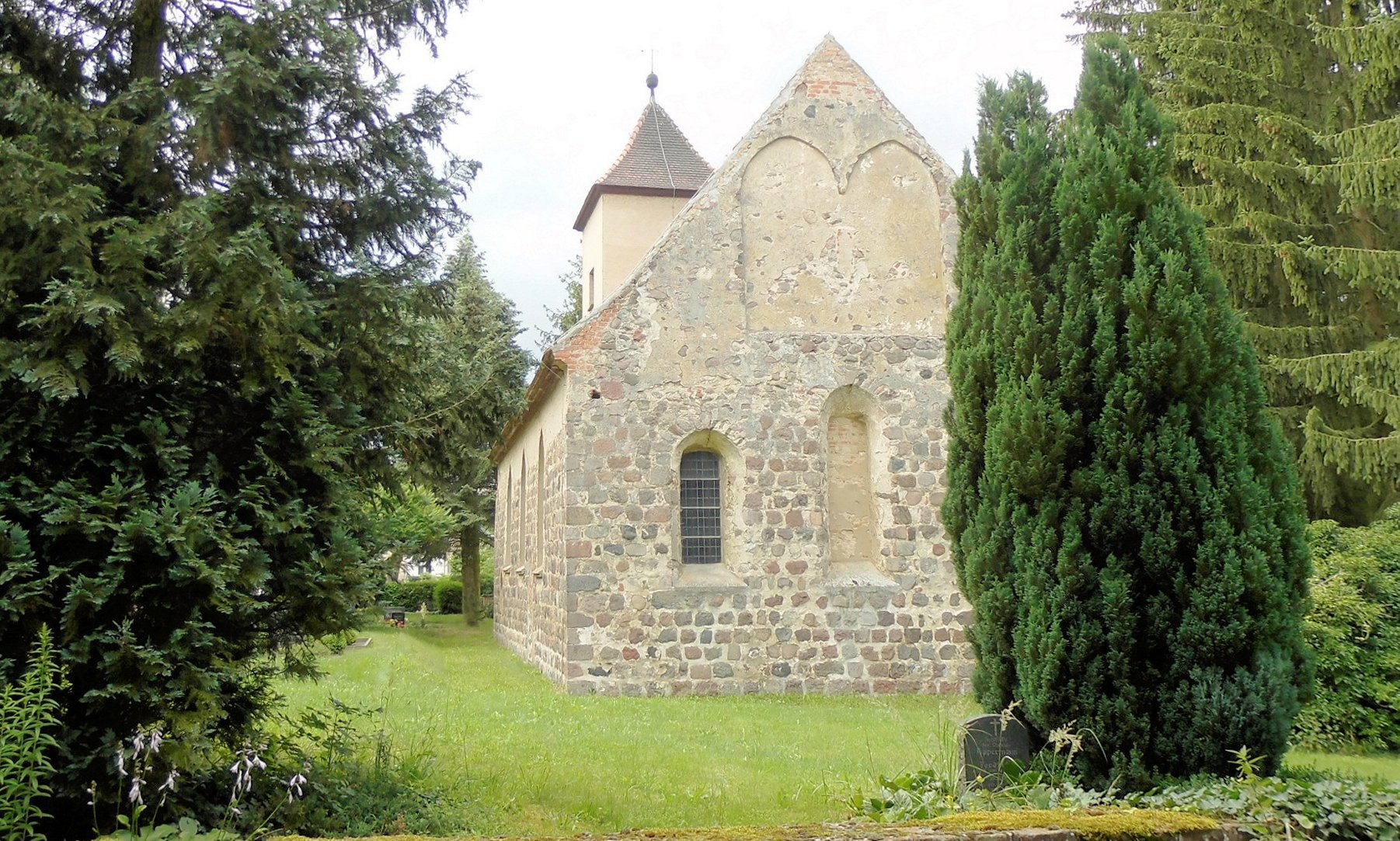 Dorfkirche in Schönfelde, Gemeinde Steinhöfel, Landkreis Oder-Spree, Deutschland